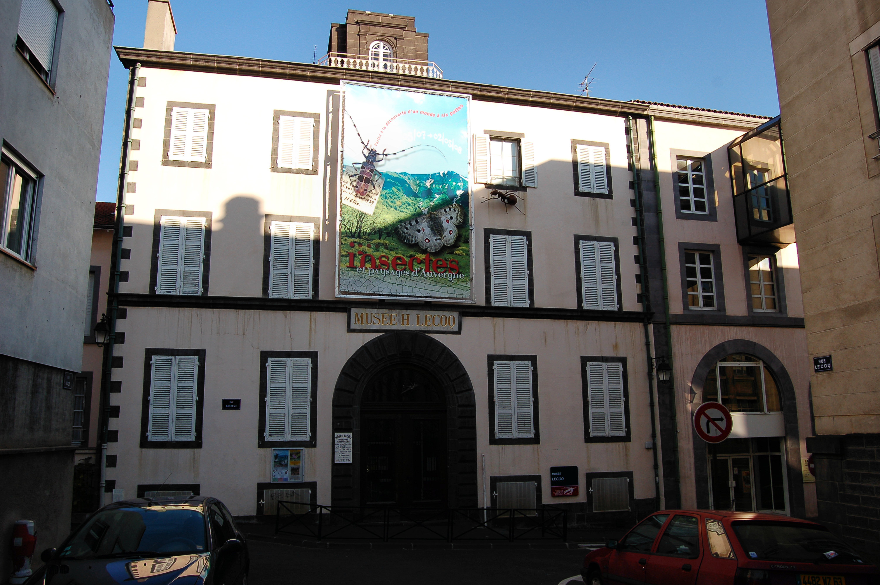 Musée Lecoq (Clermont-Ferrand, France)